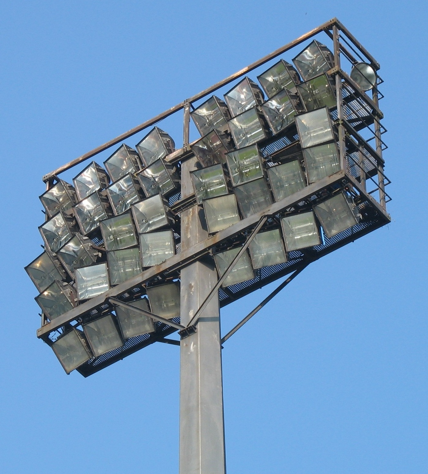 Flutlicht